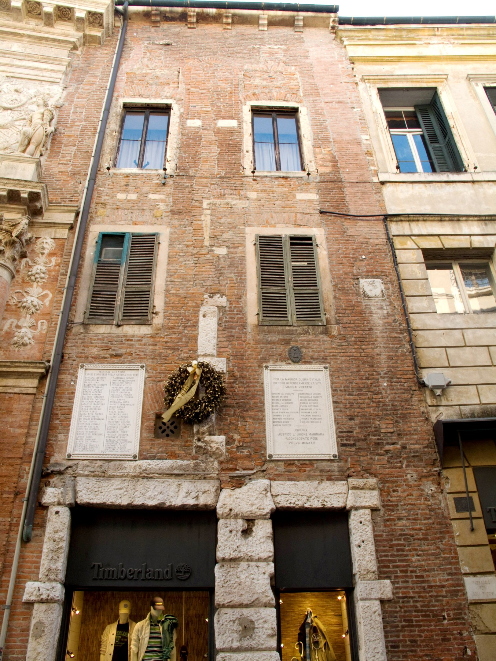 Torre dei Verlato, contrà del Monte Vicenza